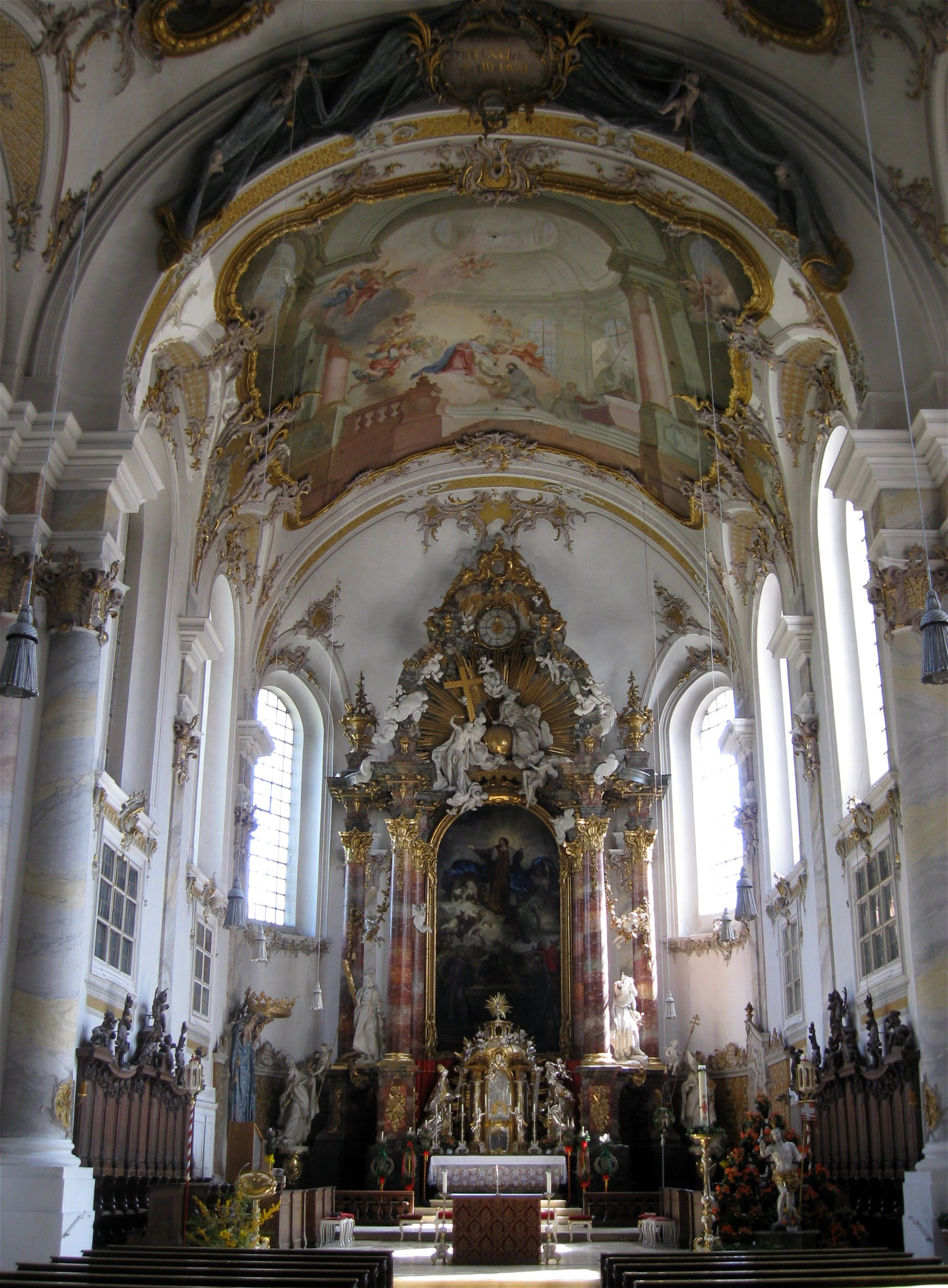 Alte Poststraße 42; Kath. Pfarrkirche St. Peter und Paul, ehem. Prämonstratenserkloster Neustift, Vierflügelanlage mit: ehem. Klosterkirche, Wandpfeilerkirche mit leicht eingezogenem Chor und seitlichem Flankenturm, von Giovanni Antonio Viscardi 1700-1715; mit Ausstattung; ehem. Klostergebäude, jetzt Landratsamt, dreigeschossiger vierflügeliger Putzbau mit Walmdach und Aufzugsgauben, 4. Viertel 17. Jh.; ehem. Klosterbibliothek, zweigeschossiger Putzbau mit steilem Satteldach und Fassadengliederung, 17. Jh. Innenraum